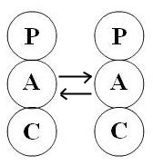 പക്വഭാവങ്ങൾ തമ്മിലുള്ള വിനിമയത്തിന്റെ ചിത്രം. P-പിതൃഭാവം A-പക്വഭാവം C-ശിശുഭാവം